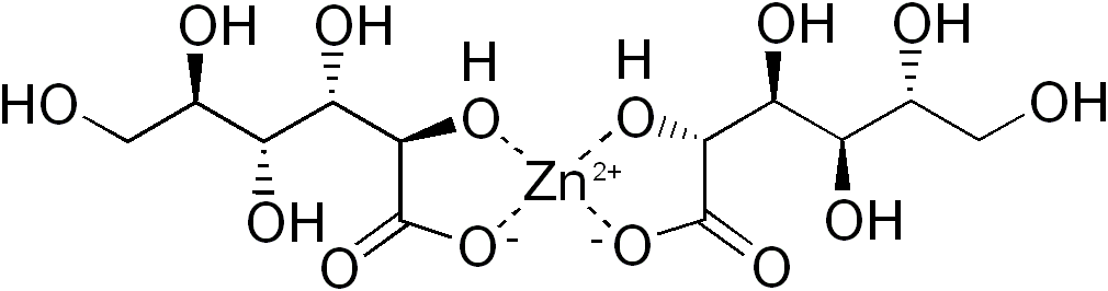 chemical structure of zinc gluconate